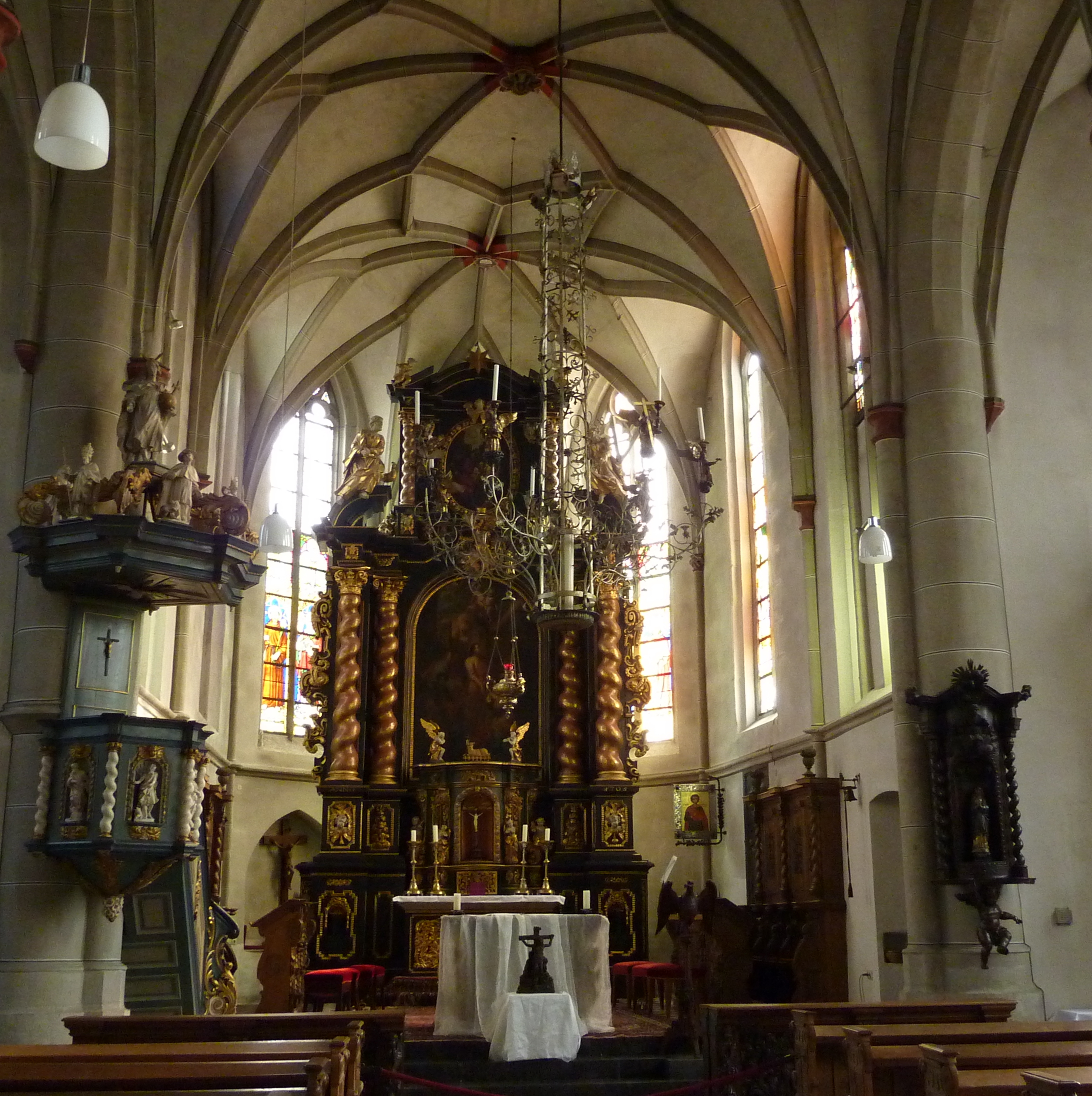 katholische Pfarrkirche St. Pantaleon in Unkel, Blick zum Chor